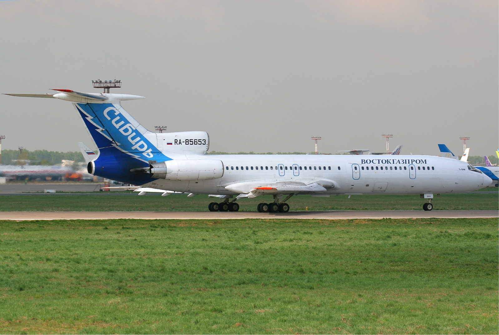 Vostokgazprom Tupolev Tu-154M